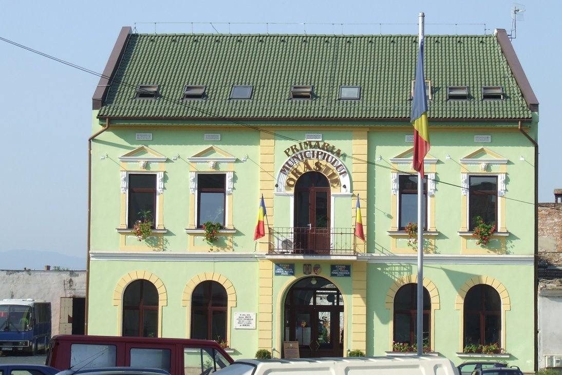 Image from Orăştie, Romania